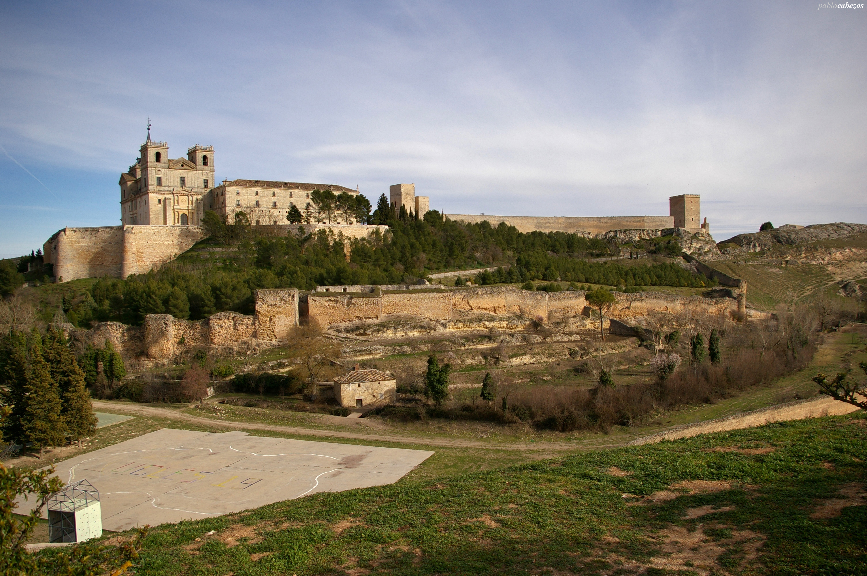 Vista del Monasterio de Uclés en la cima del cerro de El Portillo. Fue construido entre el siglo XVI y XVII sobre los restos del castillo musulmán (a la derecha del castillo). Debido al largo periodo de construcción tiene elementos platerescos, herrerianos y churrigueresco. Fue construido por la Orden de Santiago cuya casa central (Caput Ordinis) se encontraba allí. Para su construcción se utilizaron materiales de la antigua ciudad romana de Segobriga.